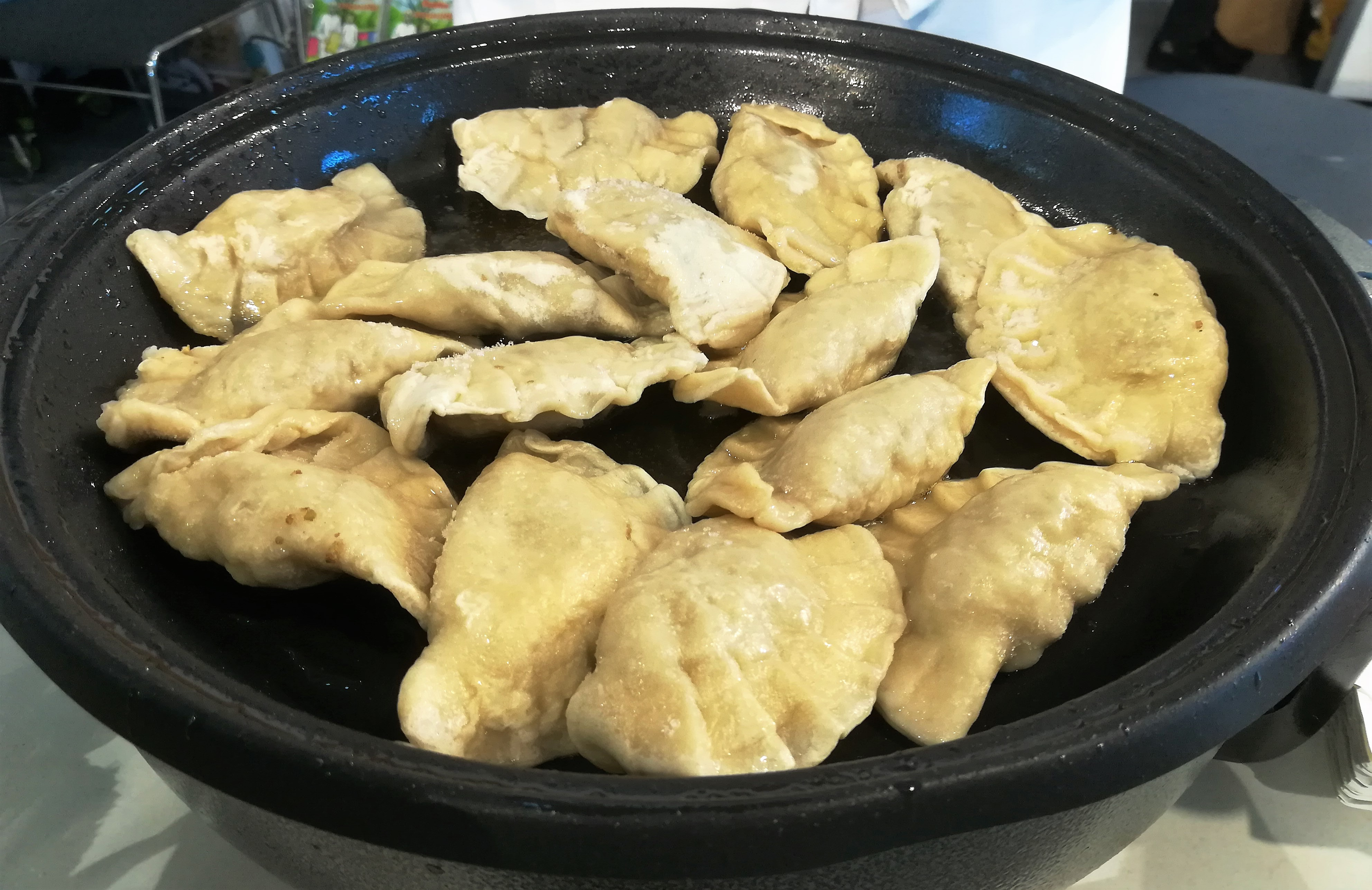 Gęsina na targach Smaki Regionów - Poznań, 2018r.